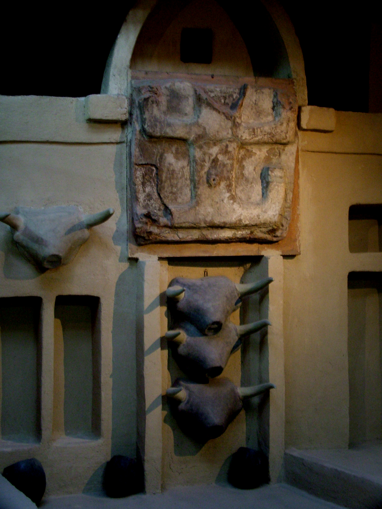 Kiállítási tér részlete (Anatóliai Civilizációk Múzeuma, Ankara, Törökország)